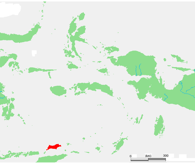 ID Wetar.PNG